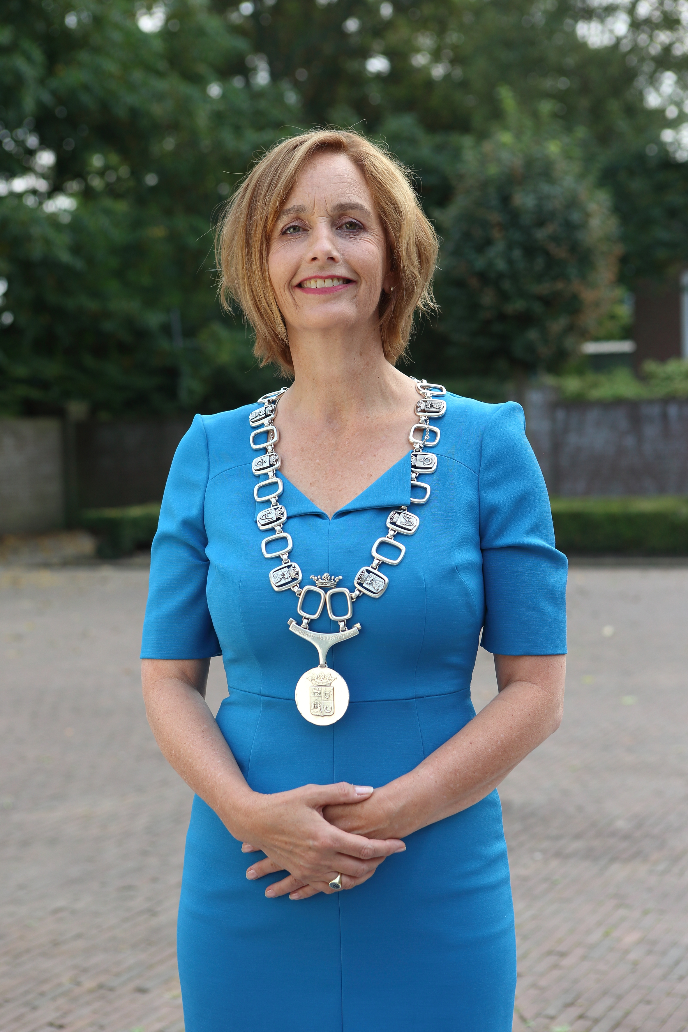 Milène Junius